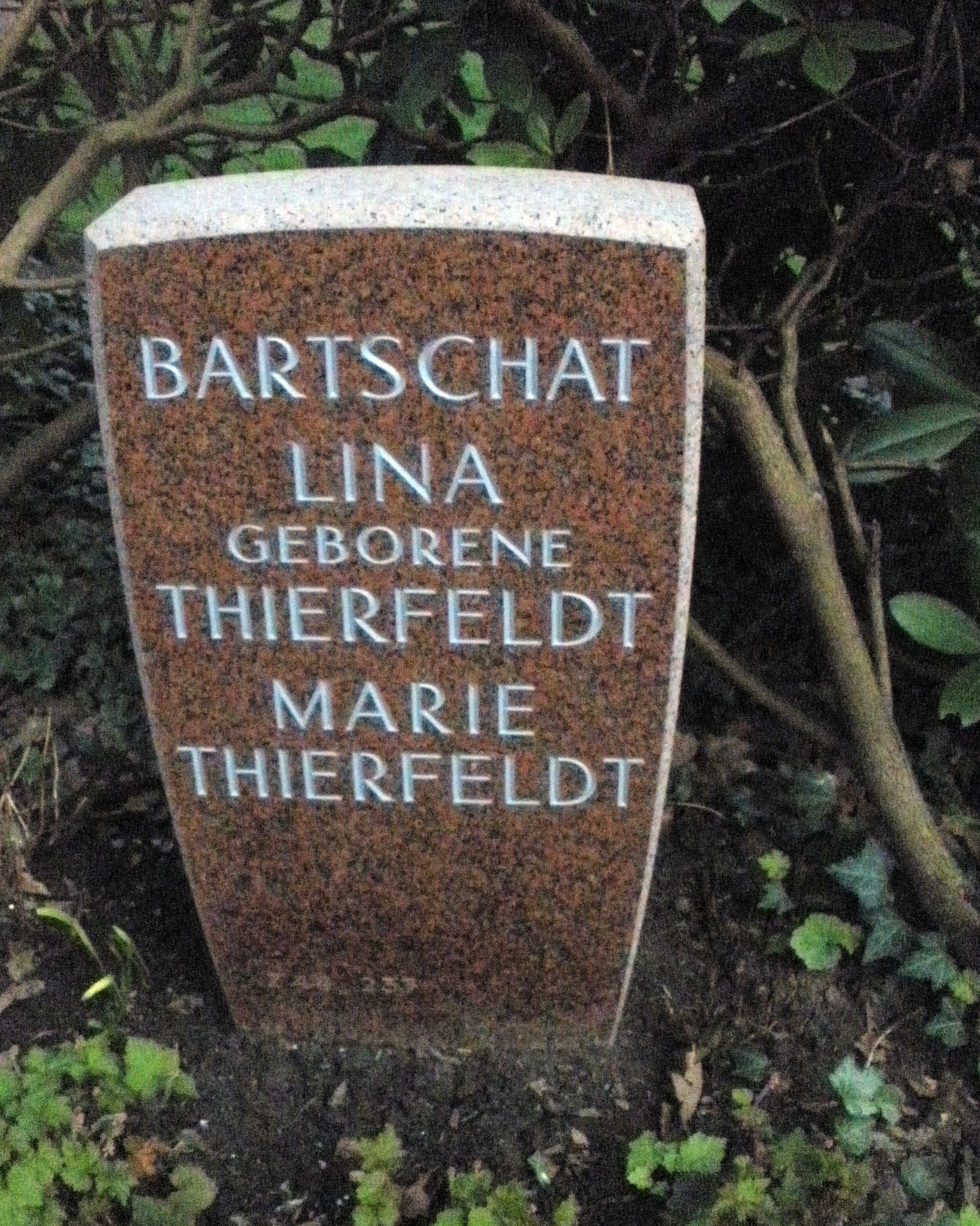 Historischer Grabstein für die deutsche Handweberin Marie Thierfeldt im Garten der Frauen, Friedhof Ohlsdorf.